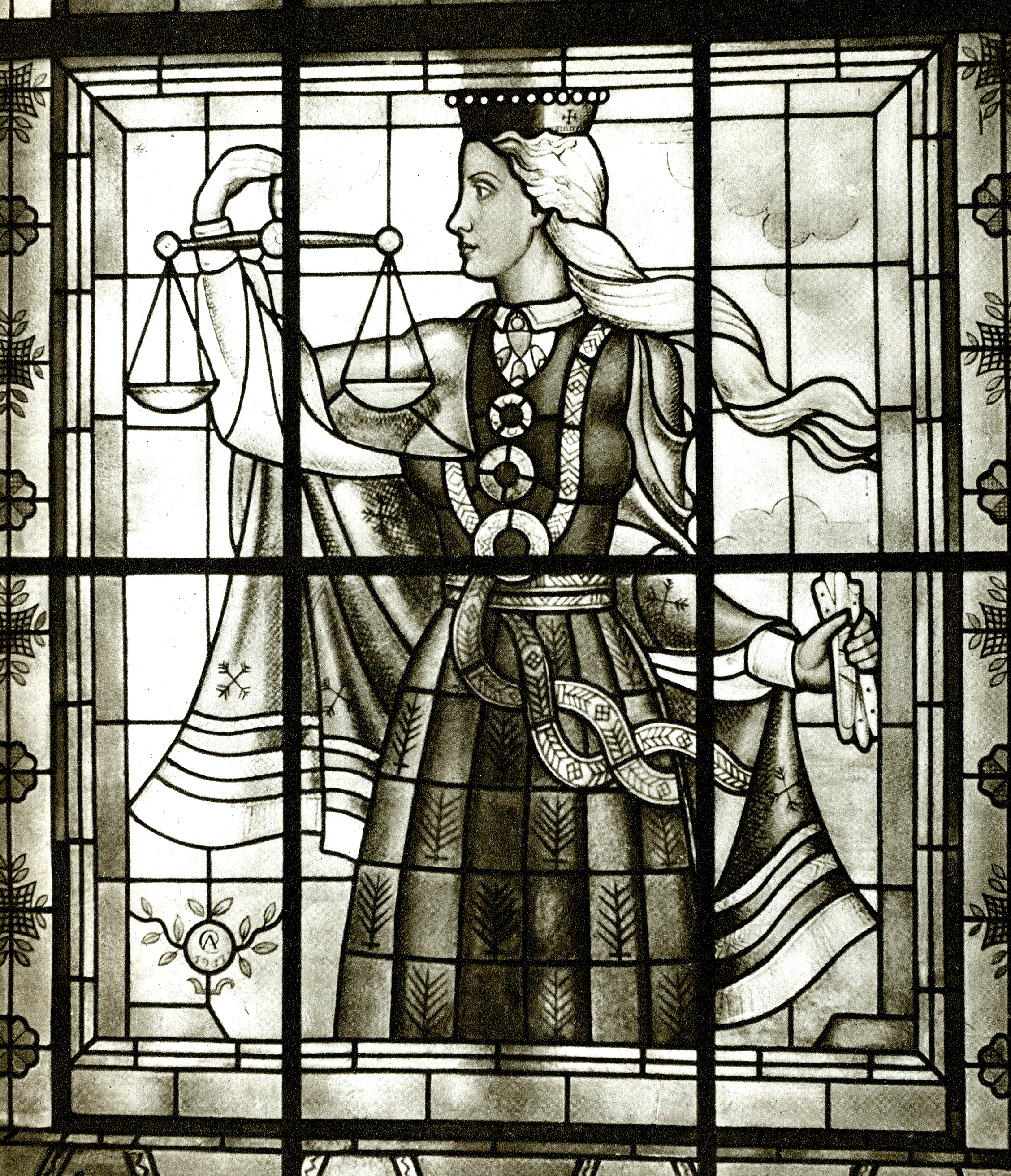 Центральная часть композиции "Торговля" (витраж), художник Ансис Цирулис.